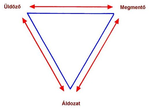 Drámaháromszög a játszmaelméletben